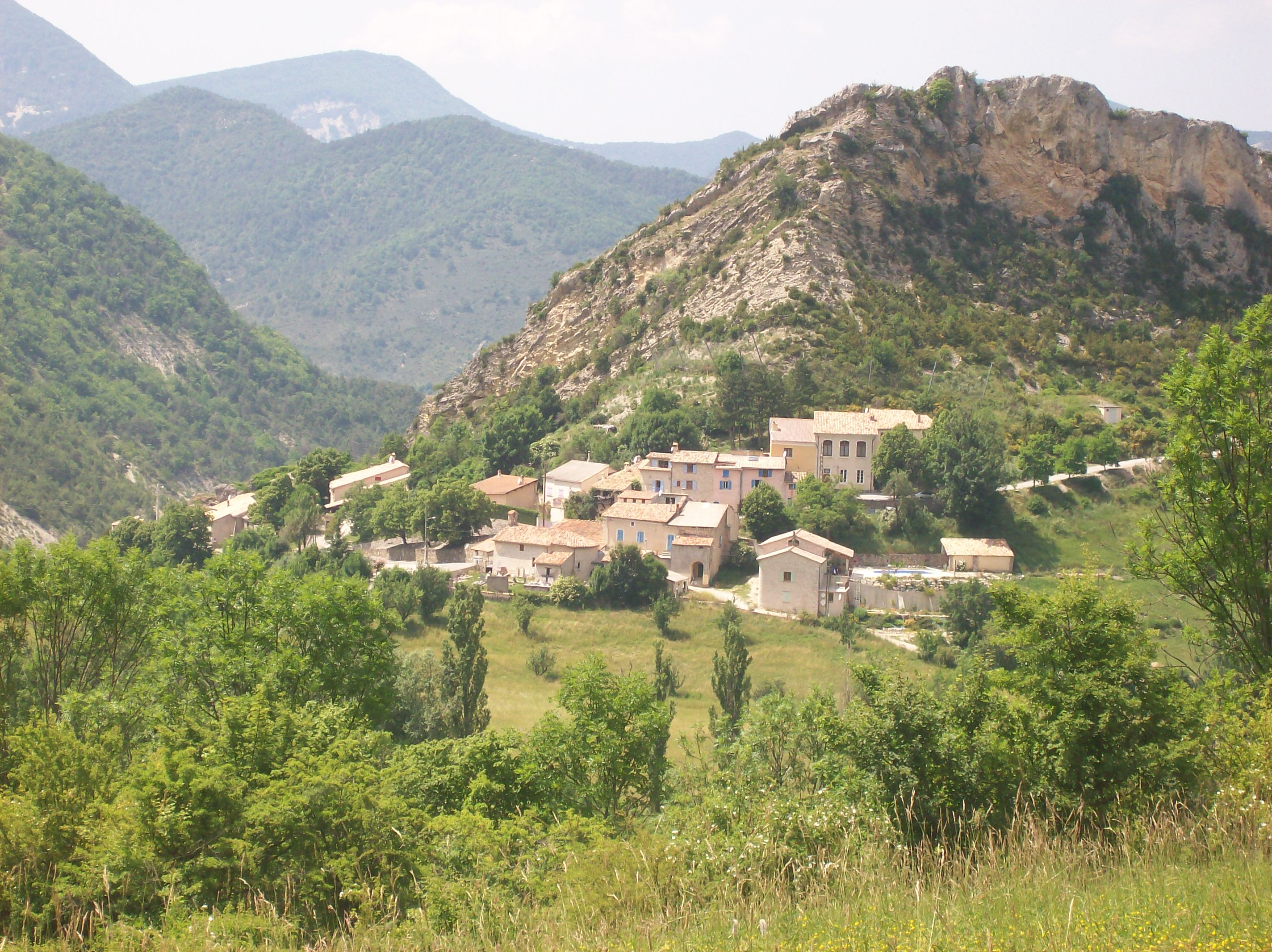 panorama général du village de Sainte-Colombe (Hautes-Alpes)